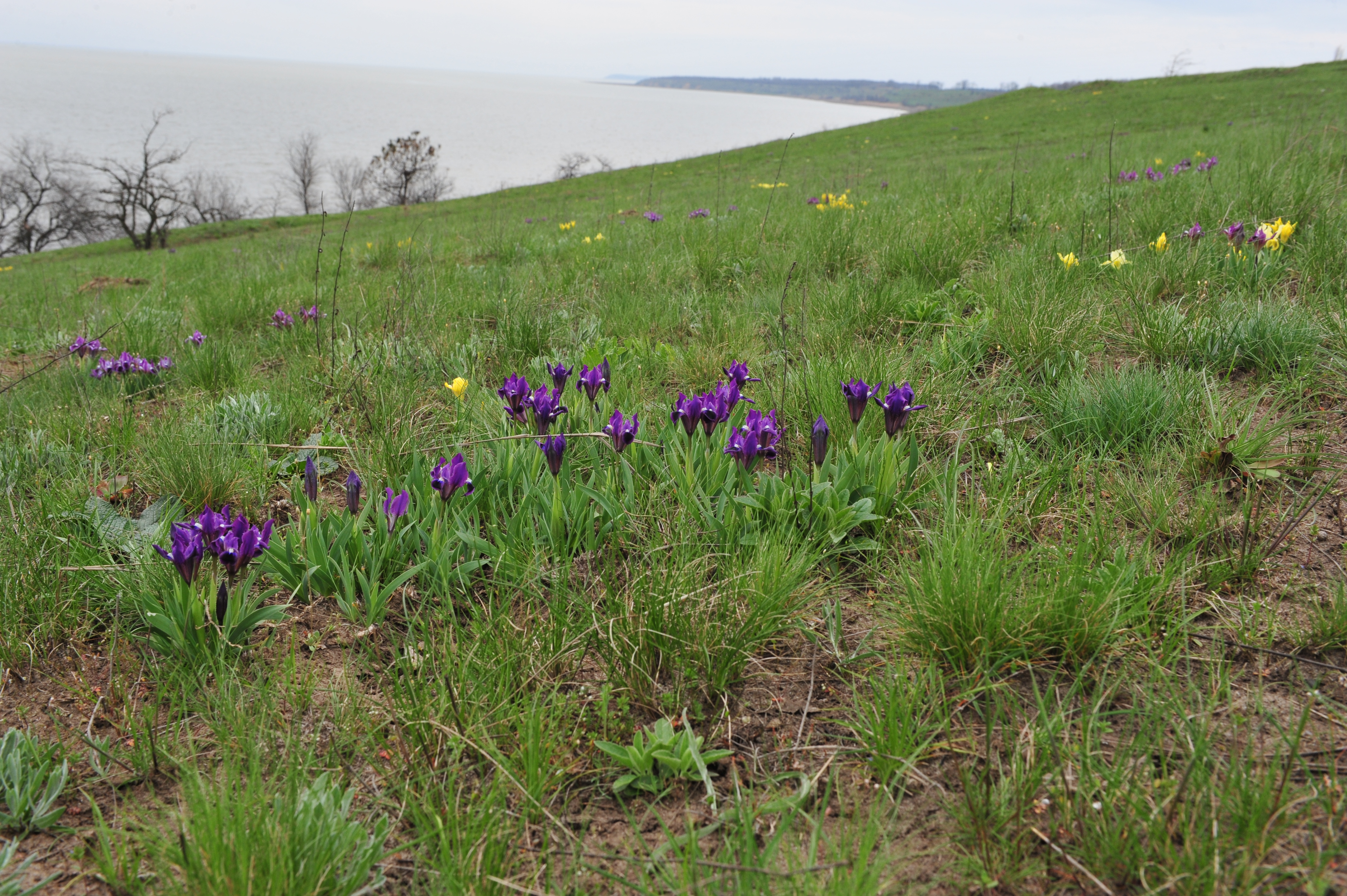 «Молочний лиман», Якимівський, Мелітопольський, Приазовський райони